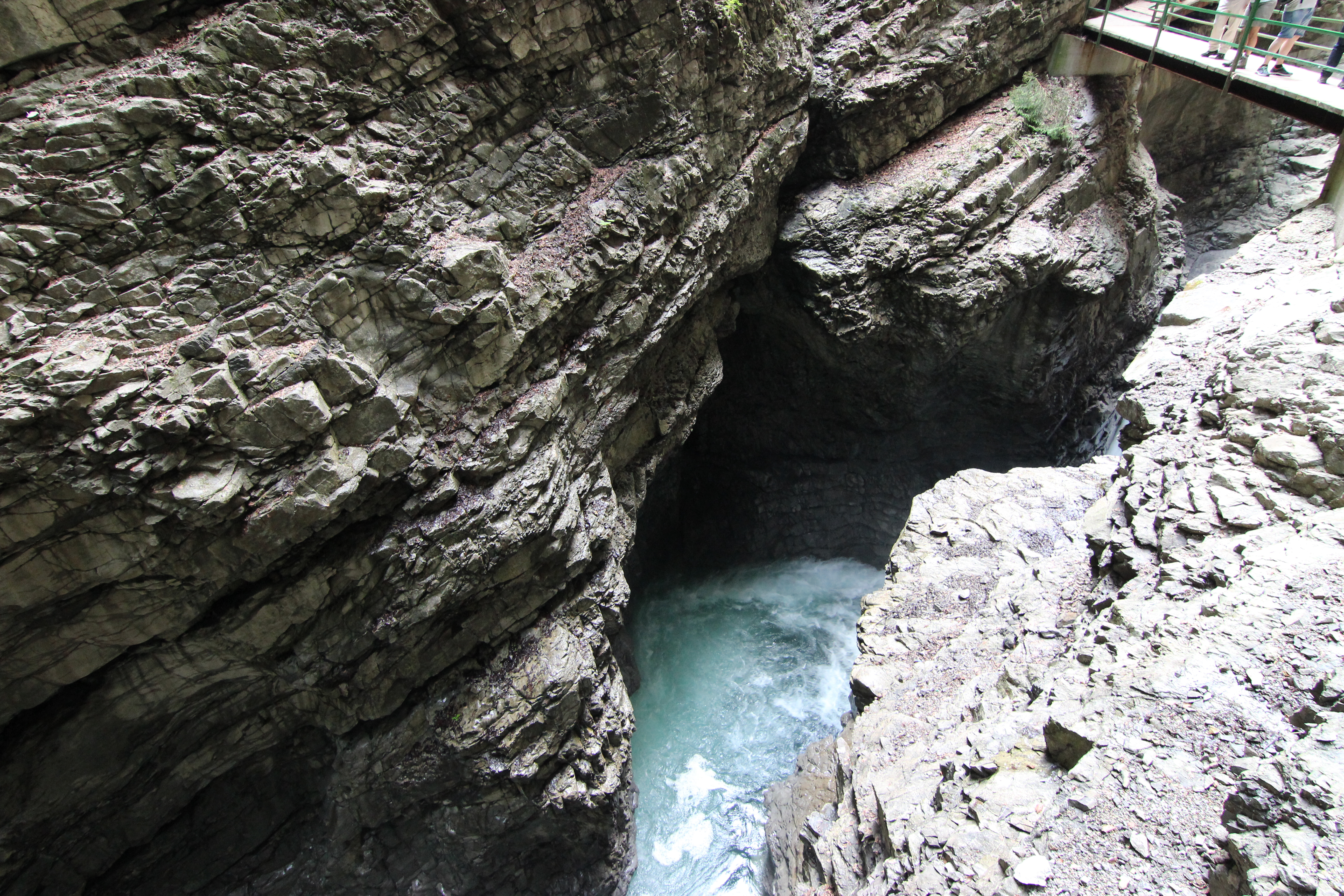 Breitachklamm bei Tiefenbach/Oberstdorf